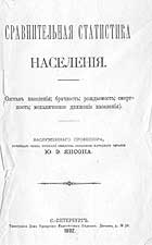 Довідкова книга з питань народного господарства.